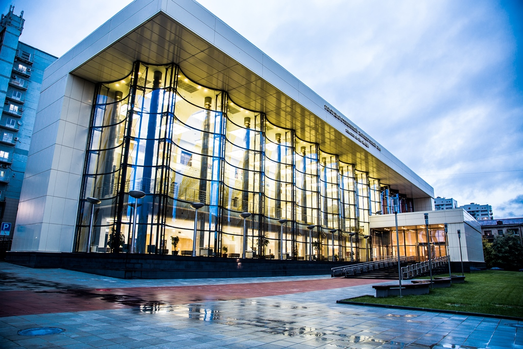 Государственный концертный зал им. Арнольда Каца